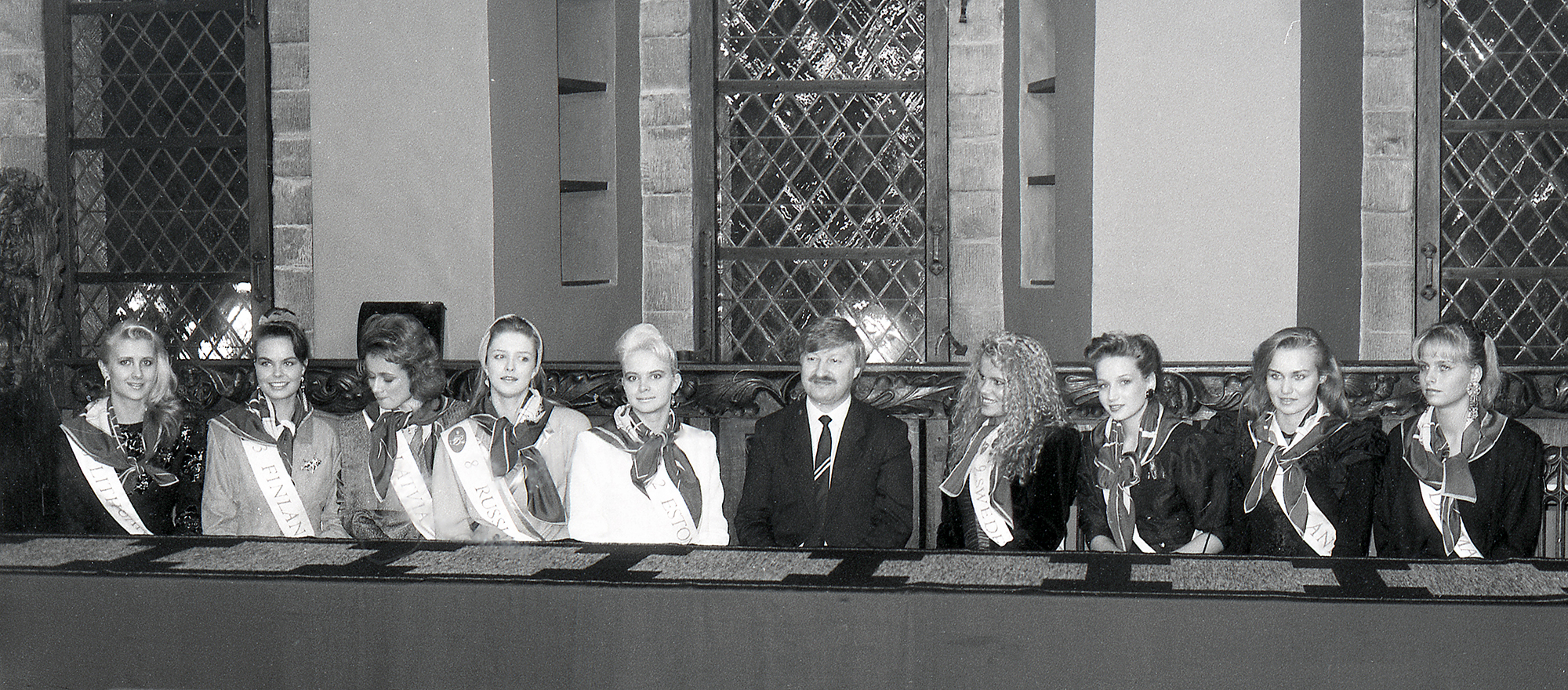 Hardo Aasmäe, Miss Baltic Sea 91 vastuvõtt Raekojas